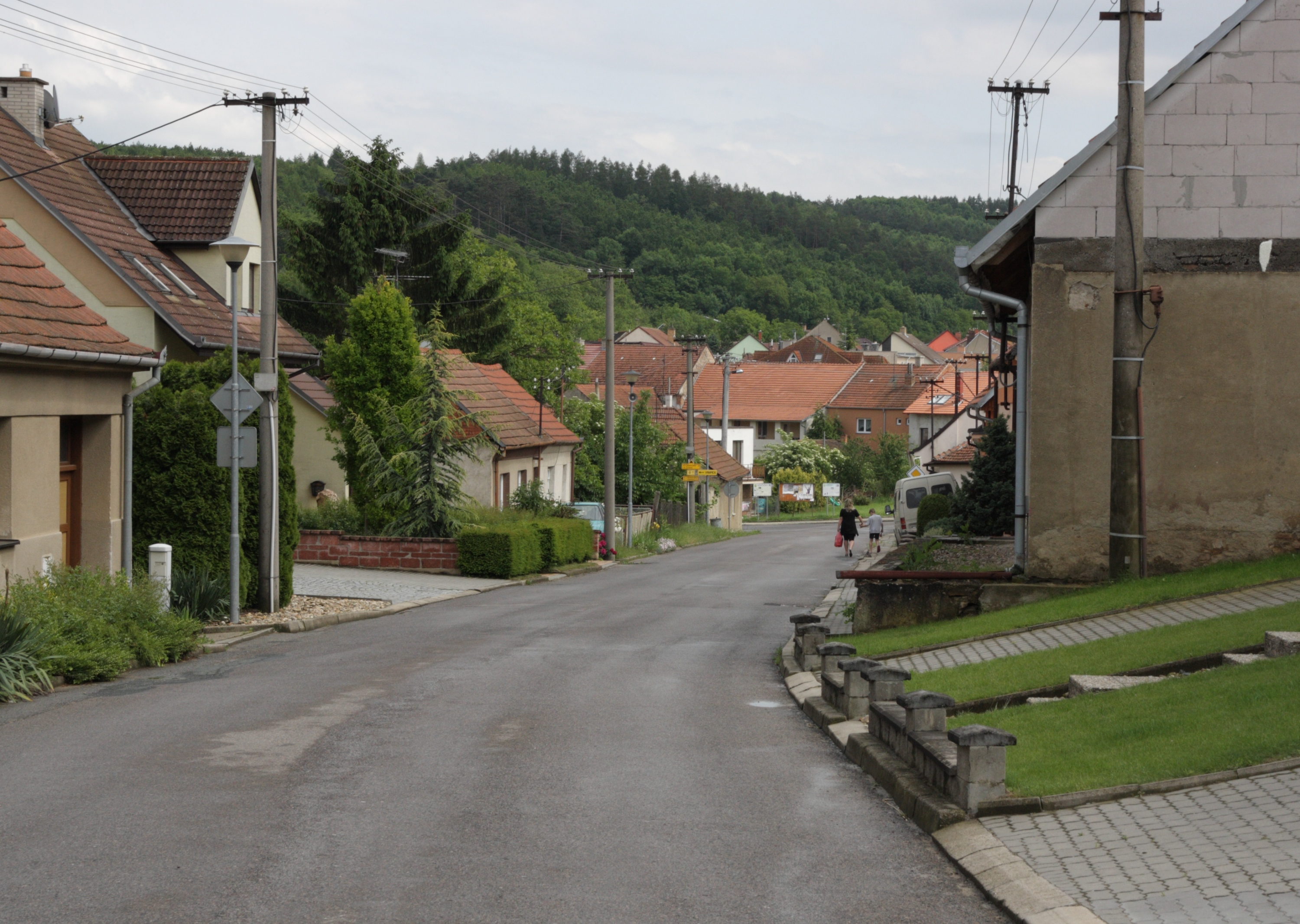 Lovčičky - pohled od silnice do Otnic.